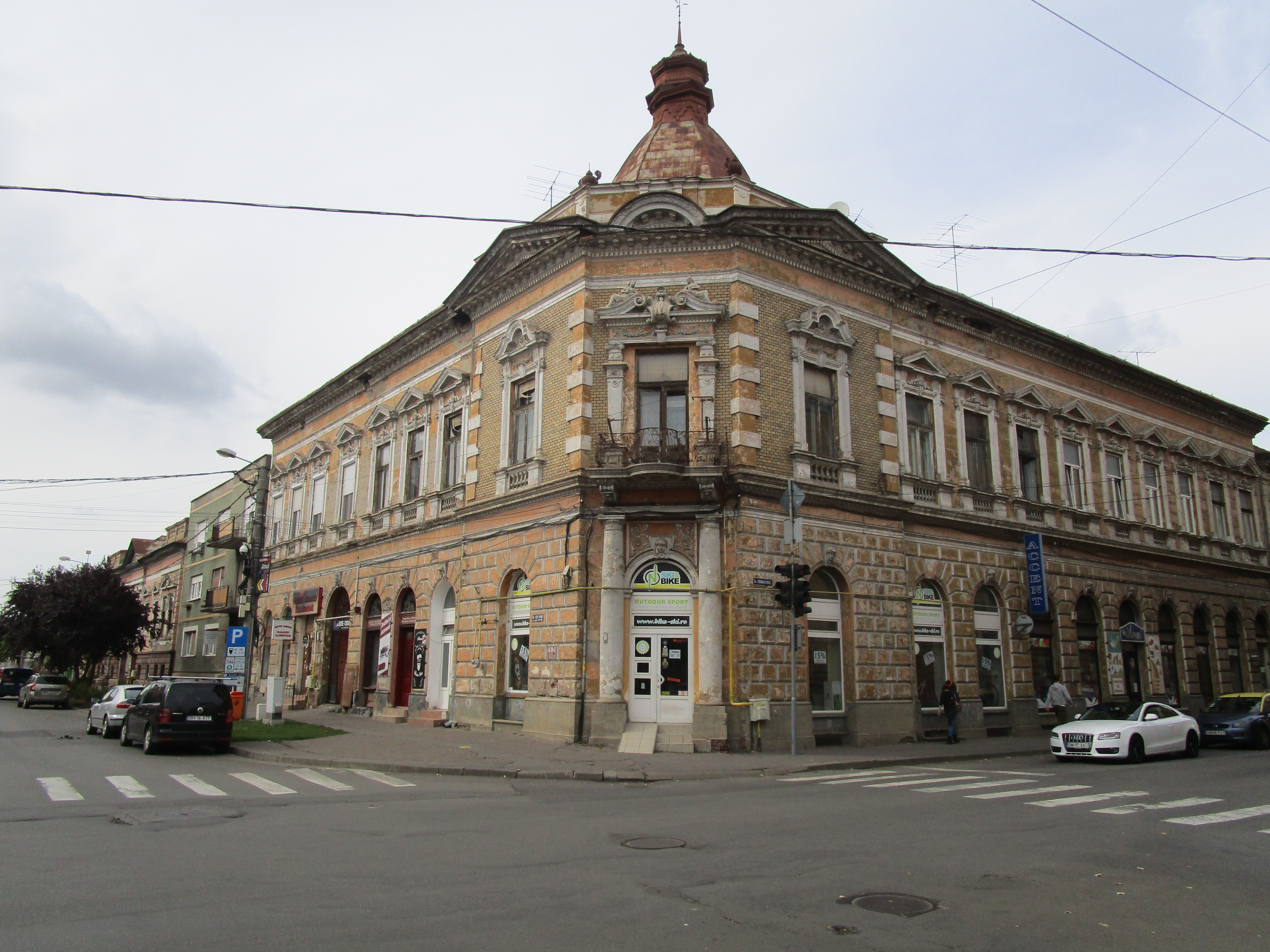 Farmacia nr. 7